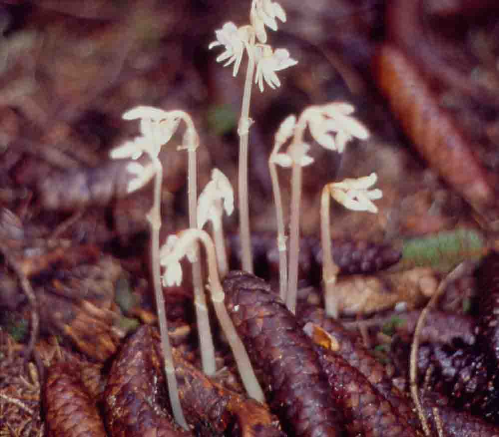 Epipogium aphyllum, typischer Wuchsort im Unterengadin